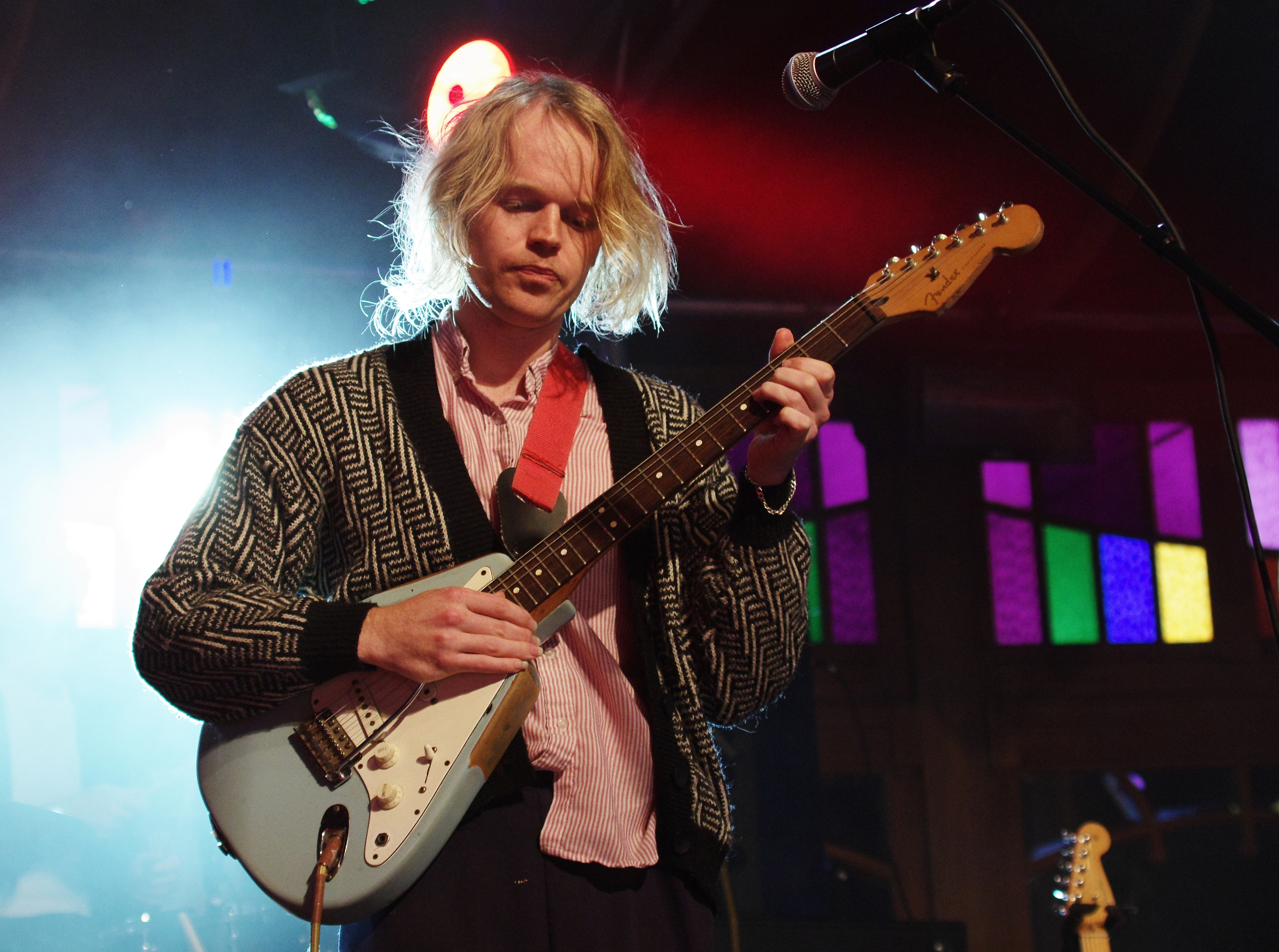 Connan Mockasin auf dem Haldern Pop Festival 2013 im Spiegelzelt